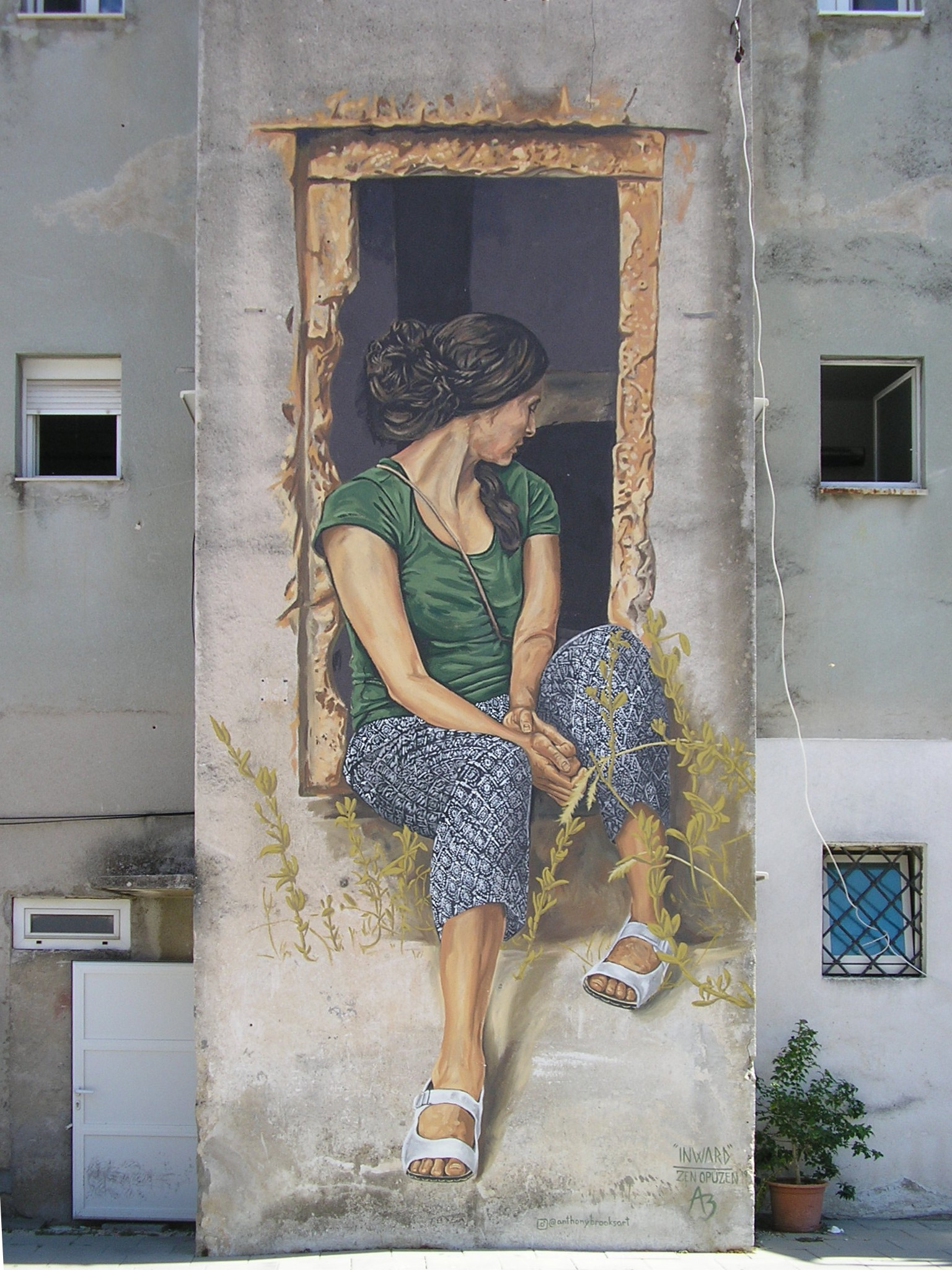 Opuzen